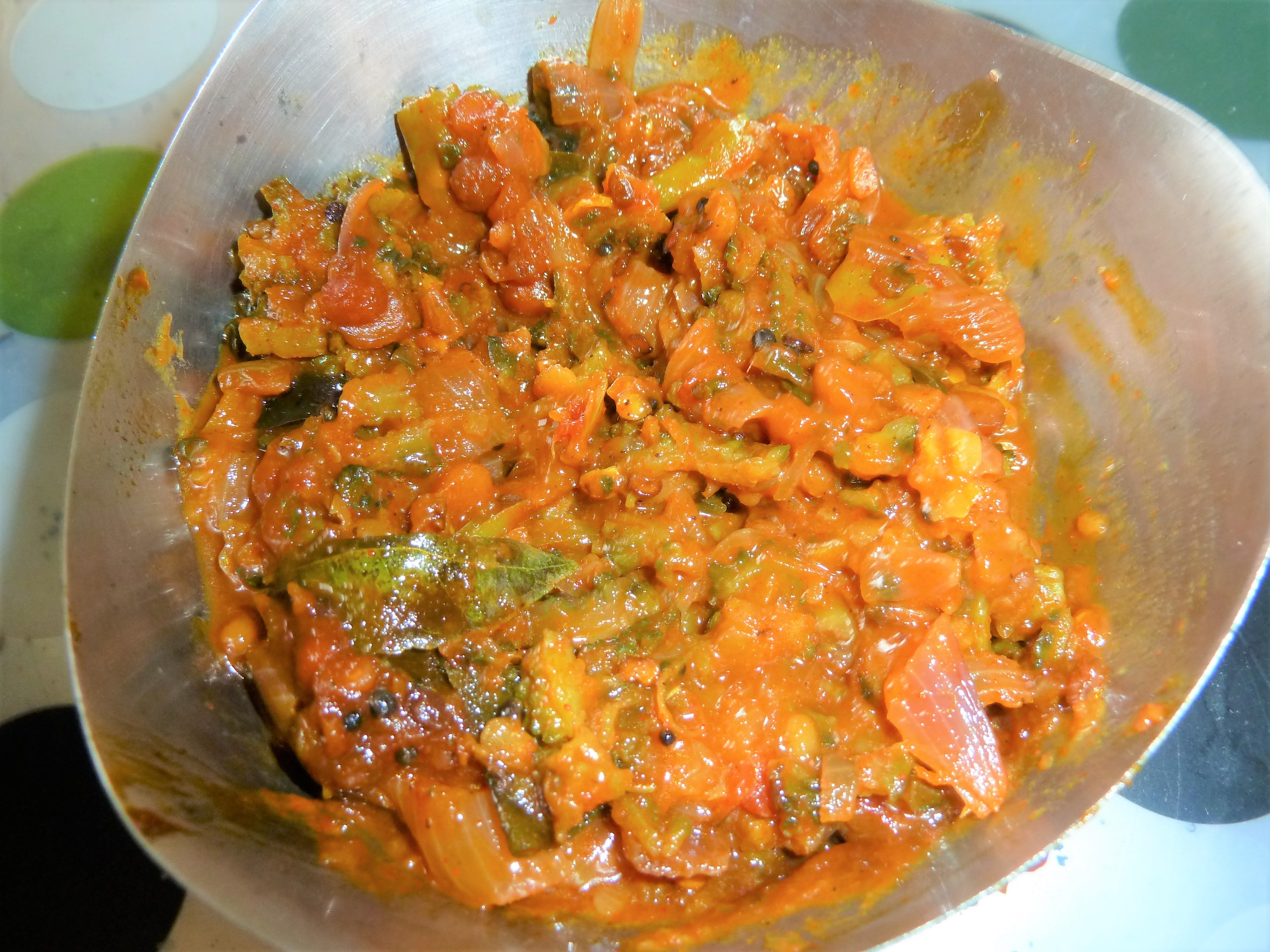 కాకరకాయ ఉల్లిపాయ పులుసు కూర